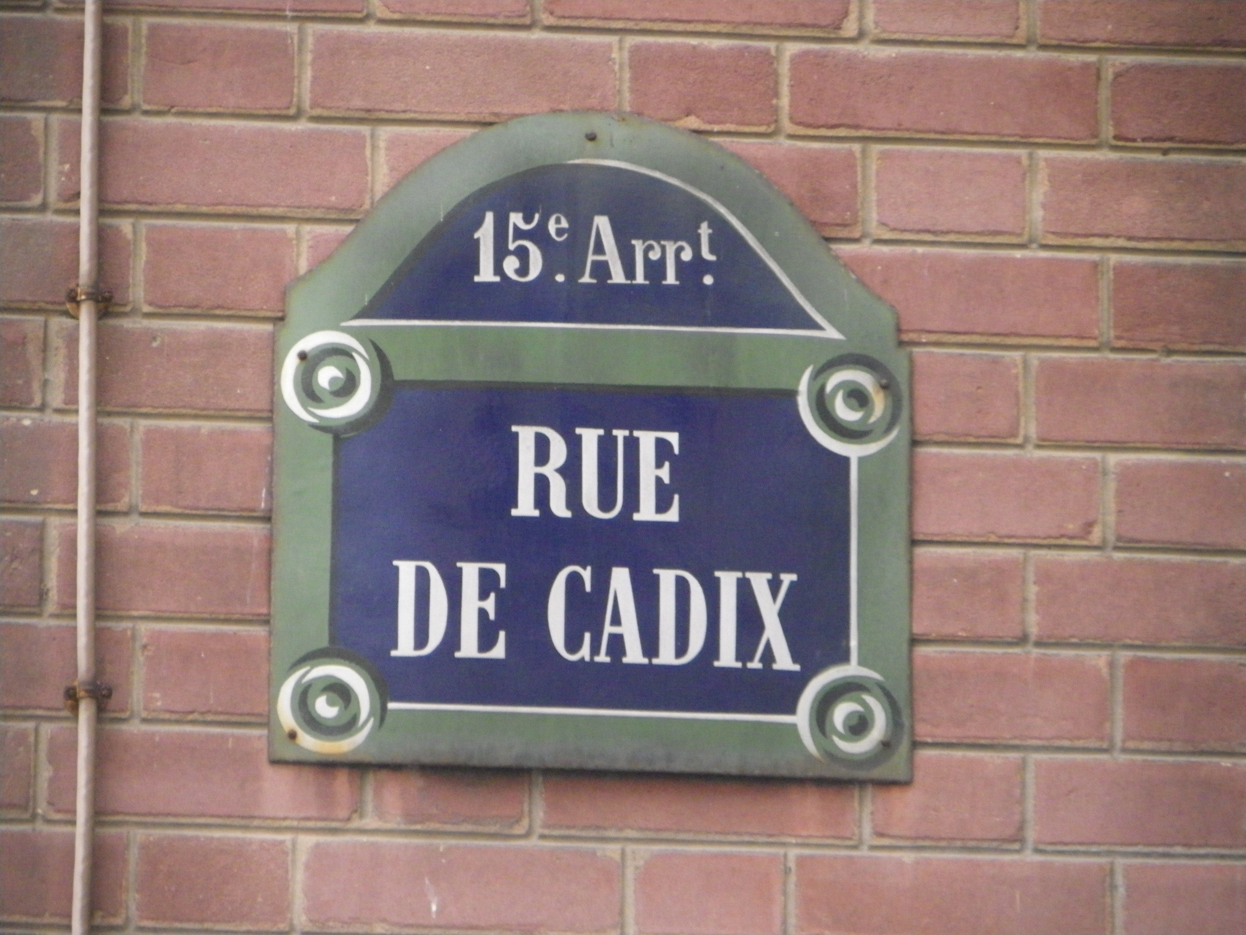 Rue de Cadix à Paris